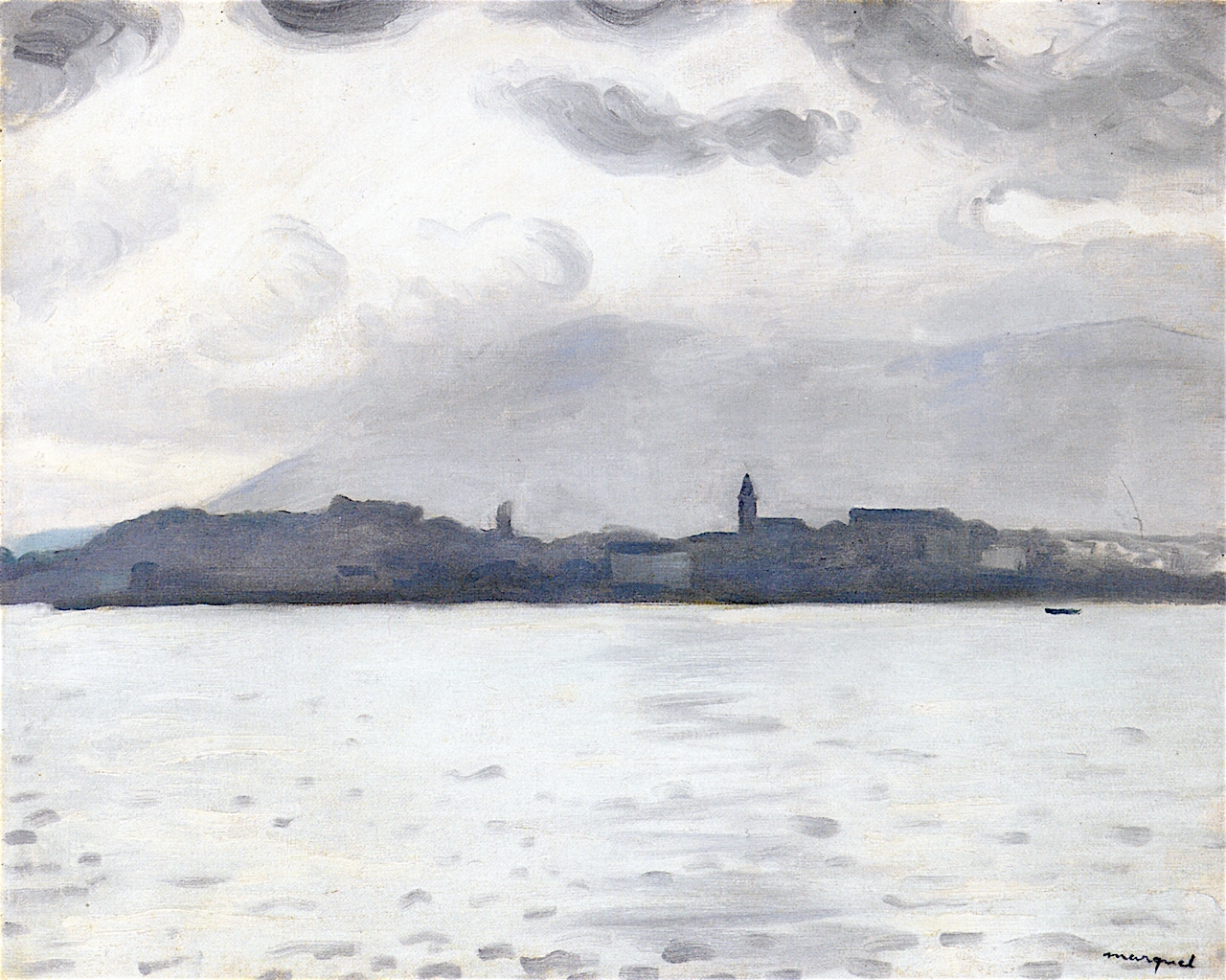 Hondarribia par temps gris